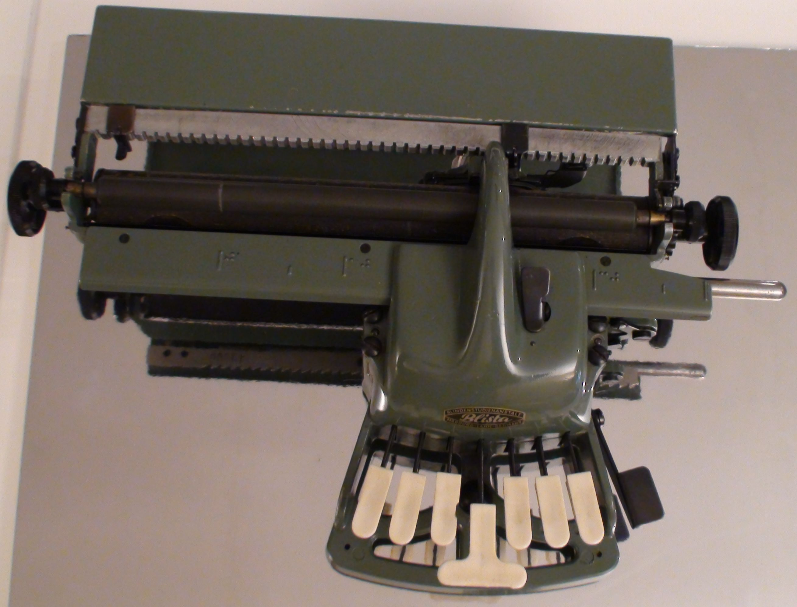 Máquina fabricada en hierro y lacada en verde, la cabeza reproductora de relieve es fija y el carro móvil. Consta de siete teclas de plástico más una espaciadora y dos fabricadas en hierro: una de retroceso y otra liberadora de carro. Está insertada en un maletín cuya tapa de asiento sirve de soporte a la máquina. Es una máquina de mediados del siglo XX